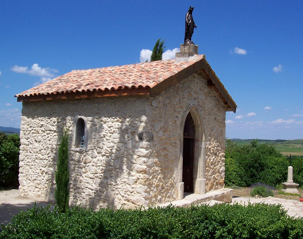 Chapelle St Pierre & St Paul ABEILHAN (34)